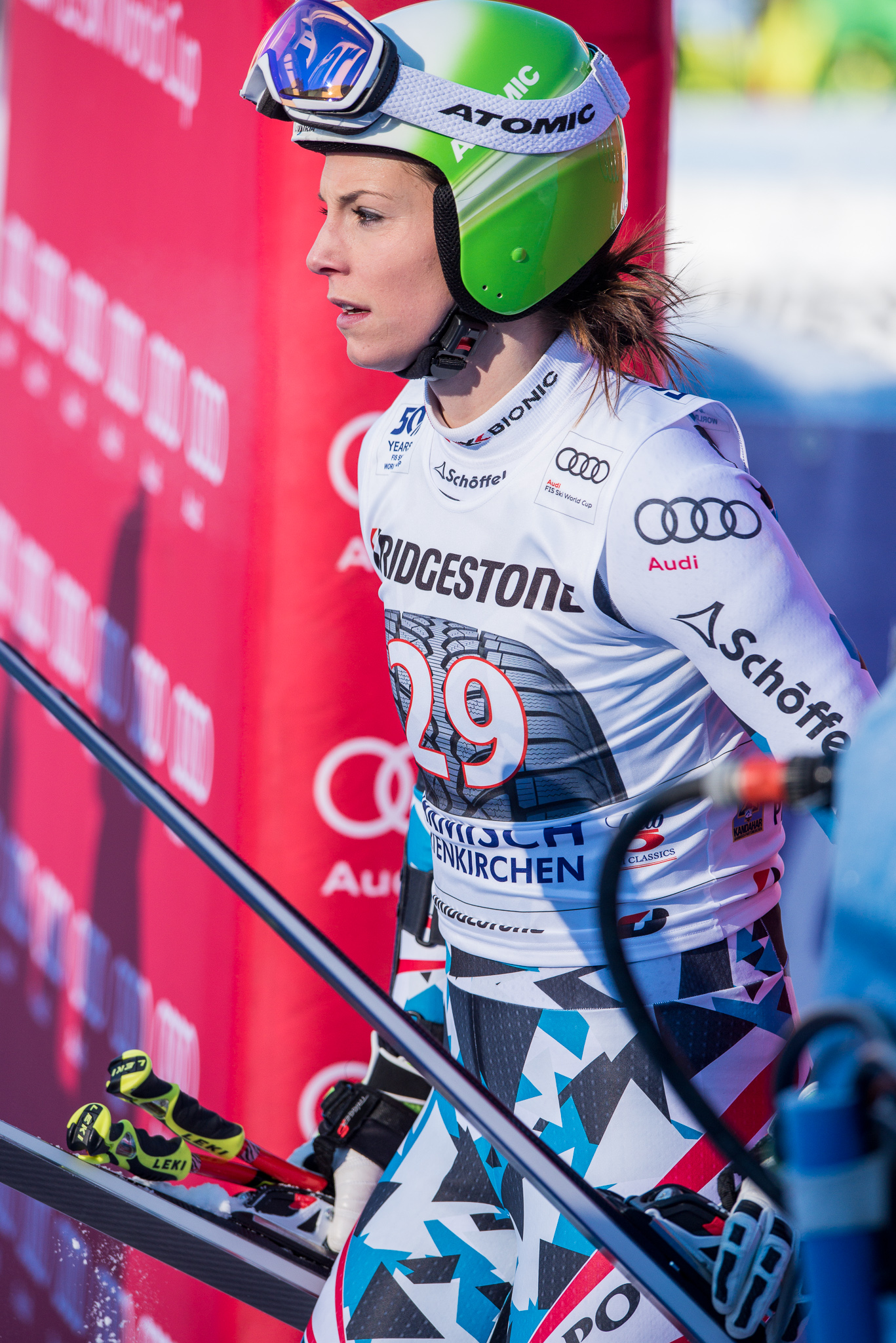 64. Kandahar Rennen,Audi FIS Ski Weltcup Garmisch-Partenkirchen,Damen Super-G,Kandahar,Ladies Super-G,Mirjam Puchner